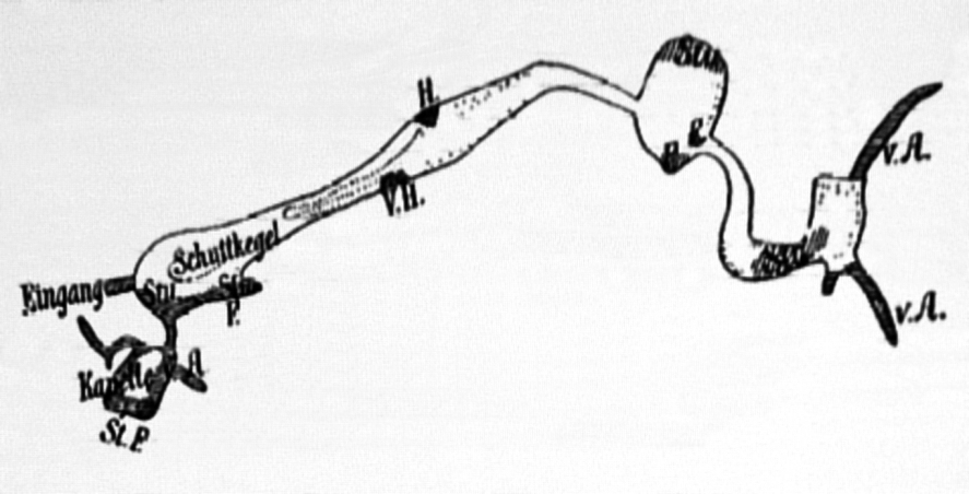 Zeichnung der Einhornhöhle von 1903 von P. Favreau nach Carl Struckmann, links der natürliche Eingang. Darstellung entspricht nicht einer modernen Vermessung